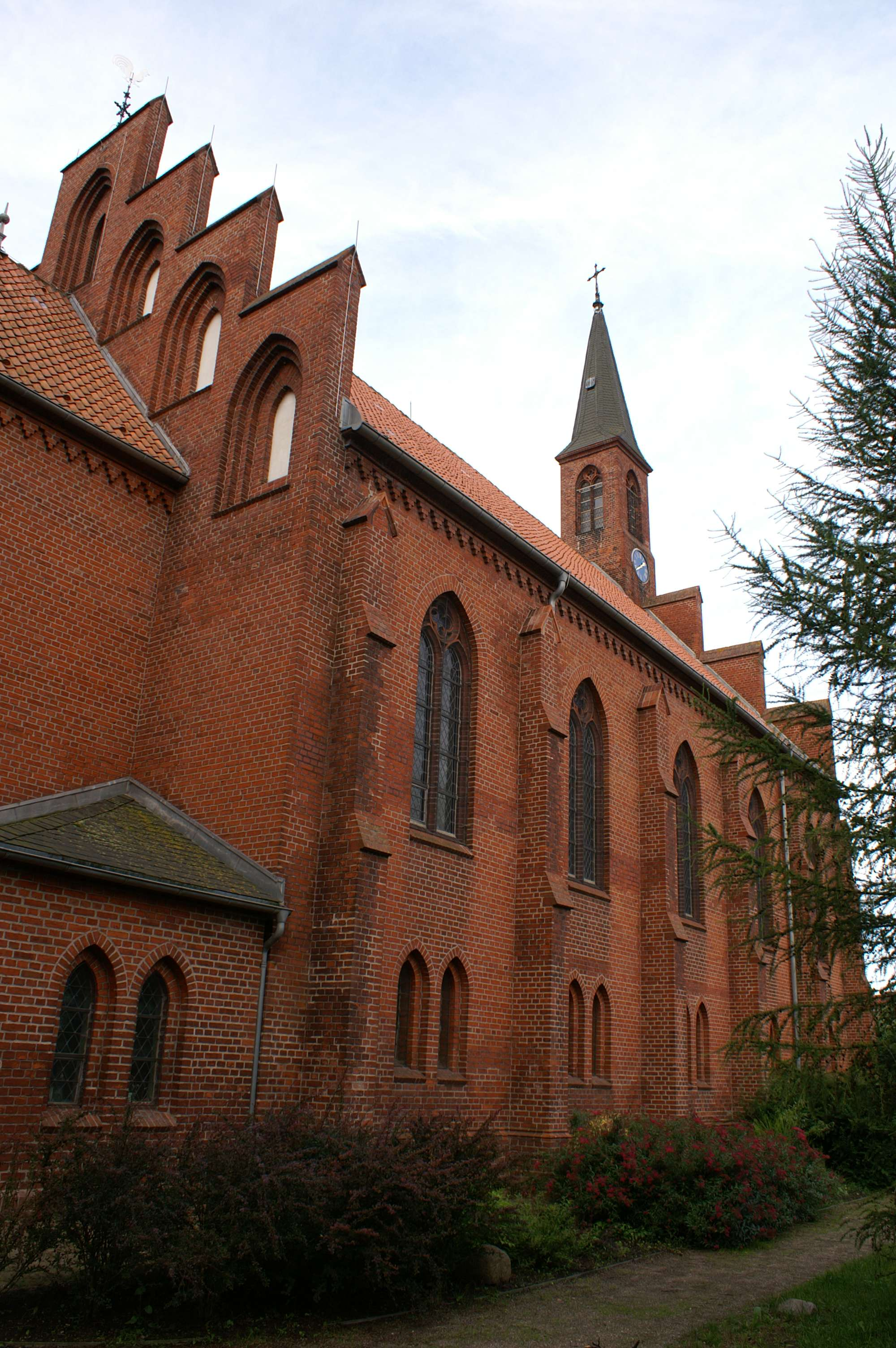 Jarmen - Landkreis Demmin - Kirche - Nordseite